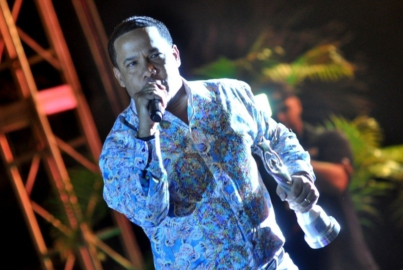 Hector Acosta "El Torito", cantante dominicano.